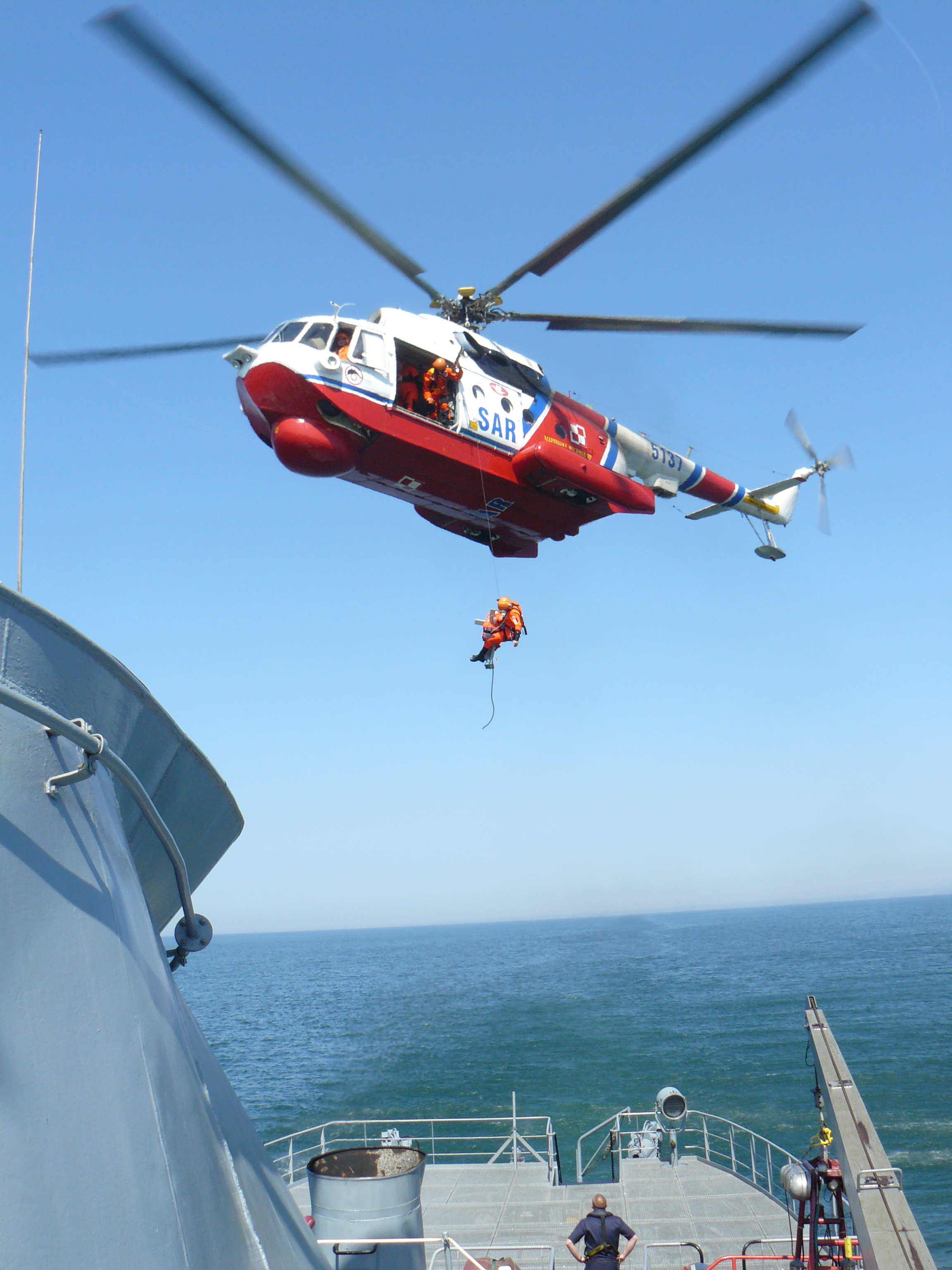 Zdjęcie wykonane podczas BALTIC SAREX 2008 niedaleko Bornholmu.